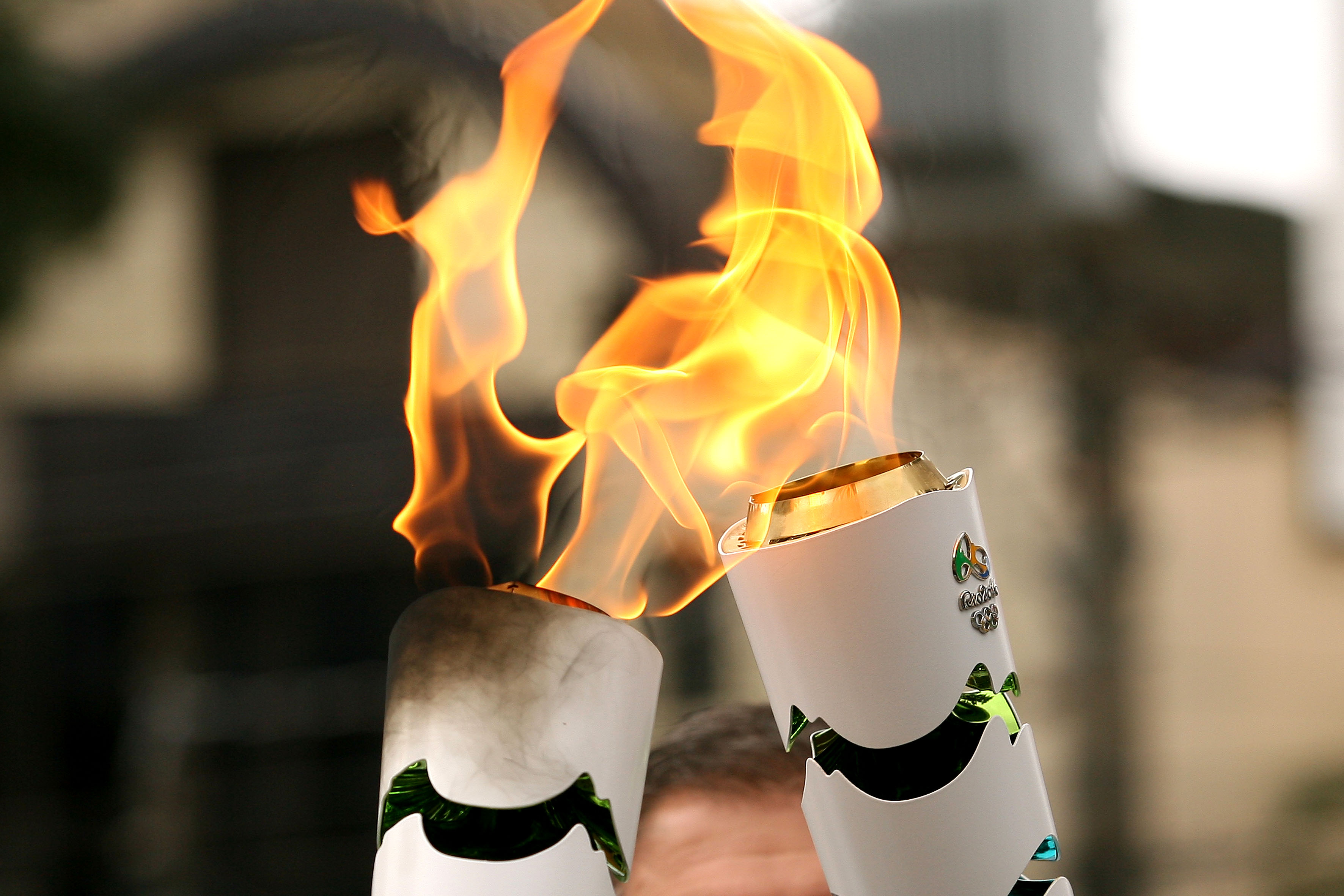 Revezamento da tocha passando pela cidade de Santos, litoral sul de São Paulo.